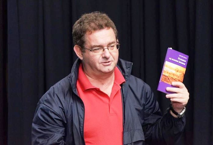 Srpski (latinica): Promocija knjige 26. septembra 2015. u SKC Budimpesta